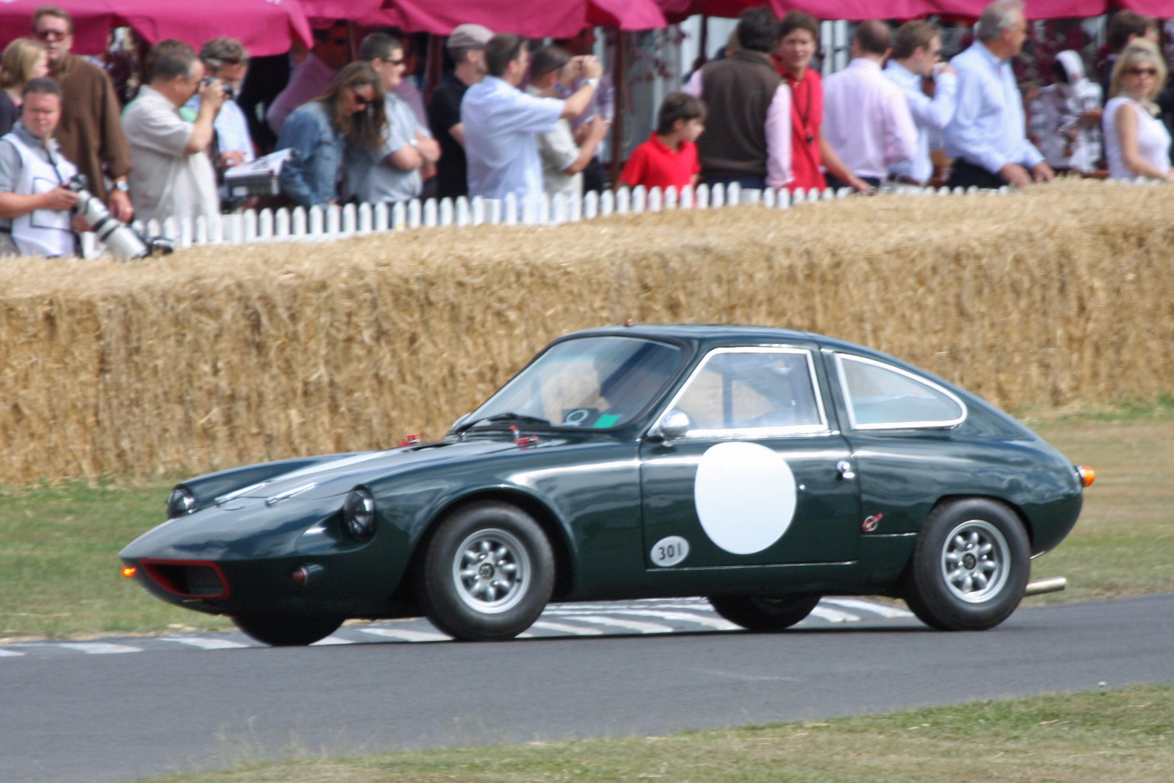 1962 Deep Sanderson 301 Coupe